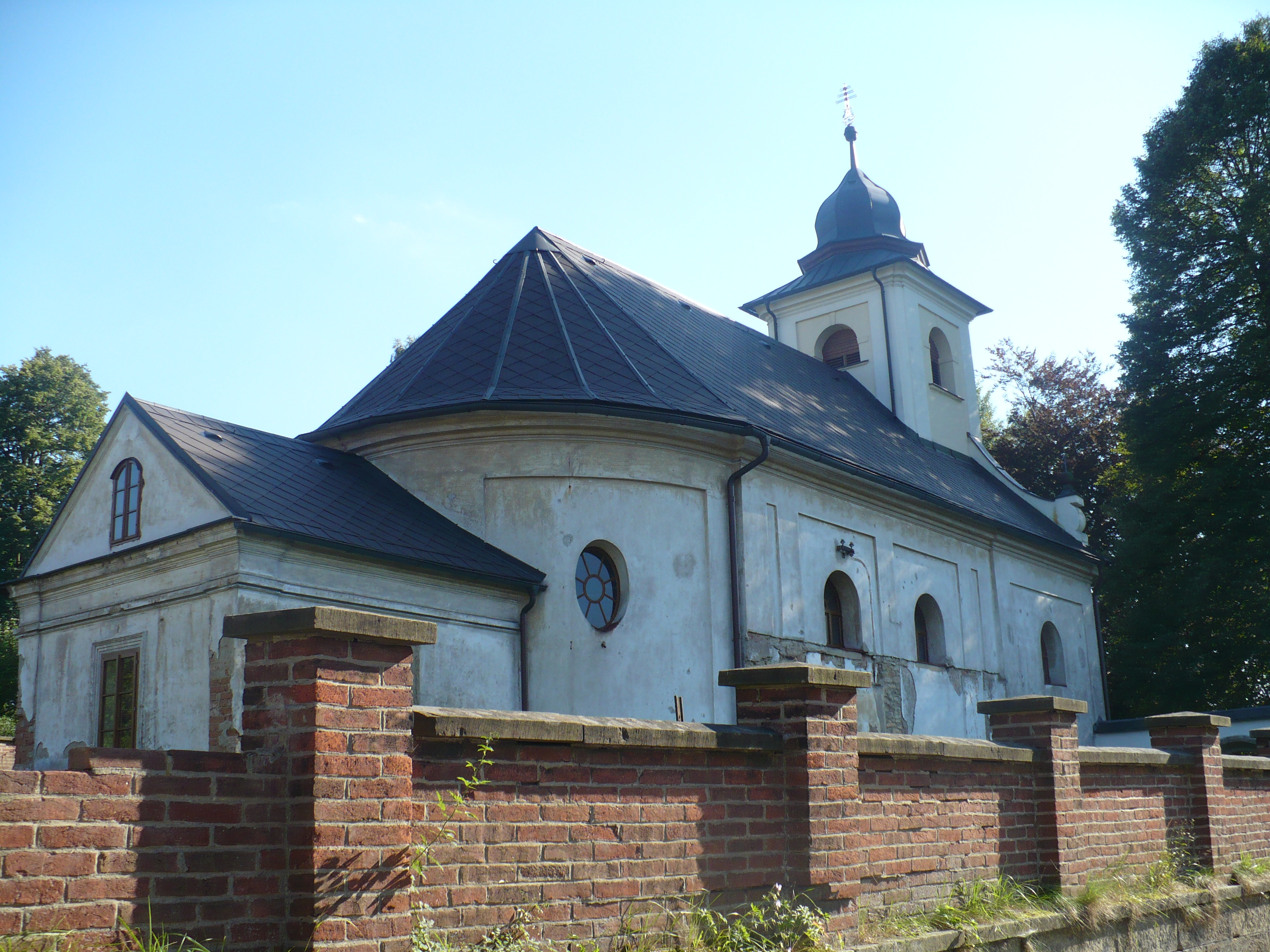 Kostel sv. Jana Nepomuckého ve Skuhrově (Česká Třebová)